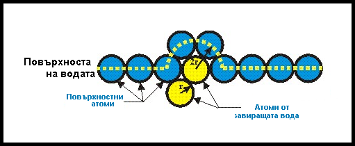 Специфична топлина на изпарение